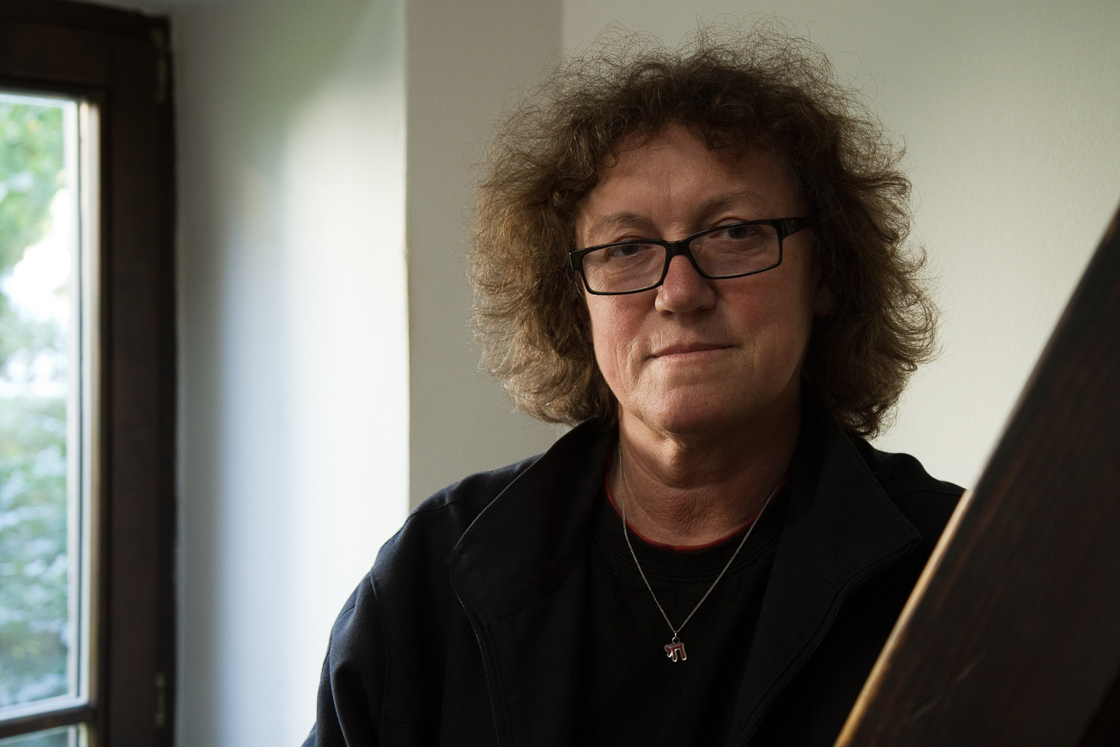 Kateřina Vinšová je česká romanistka, překladatelka a tlumočnice z francouzštiny, italštiny a němčiny.